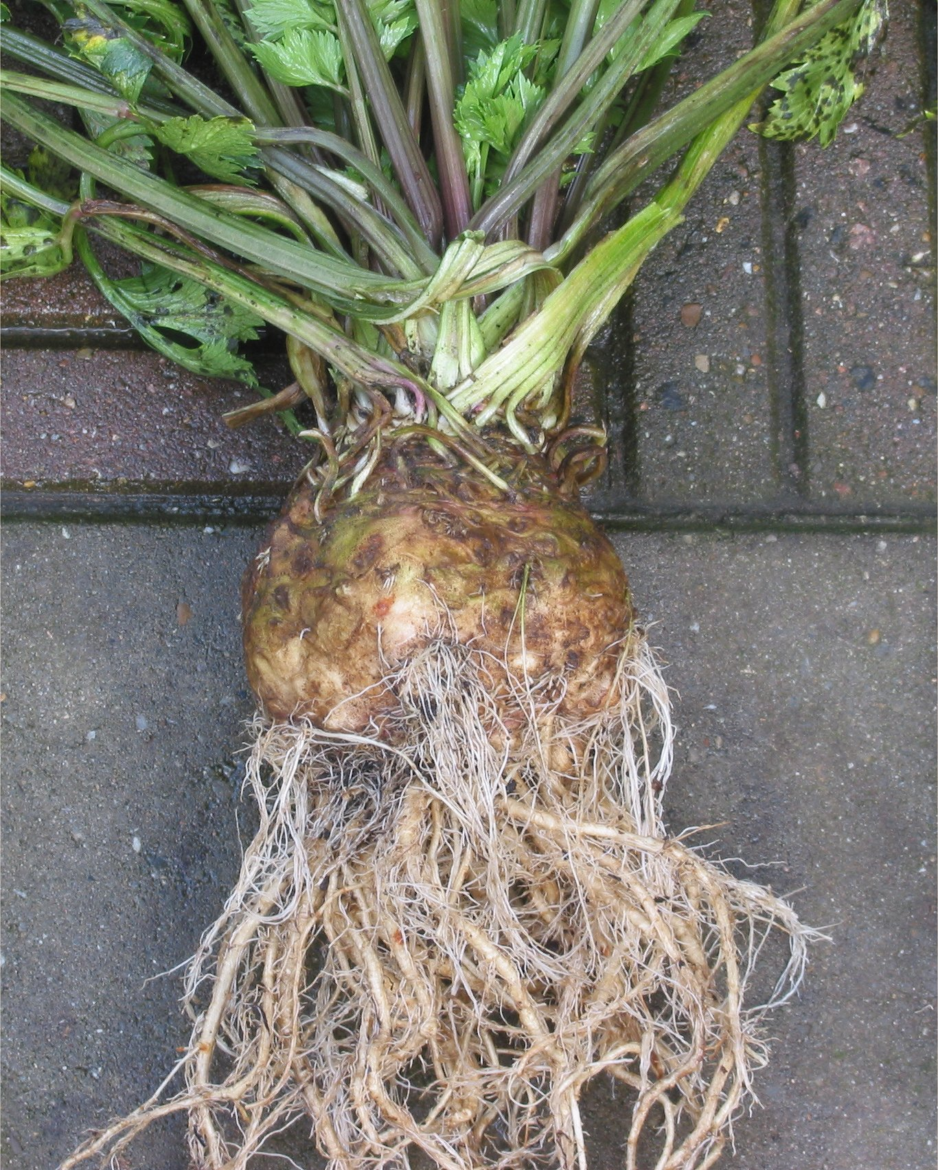 (Knolselderij knol) Apium graveolens var. rapaceum 'Dolvi'